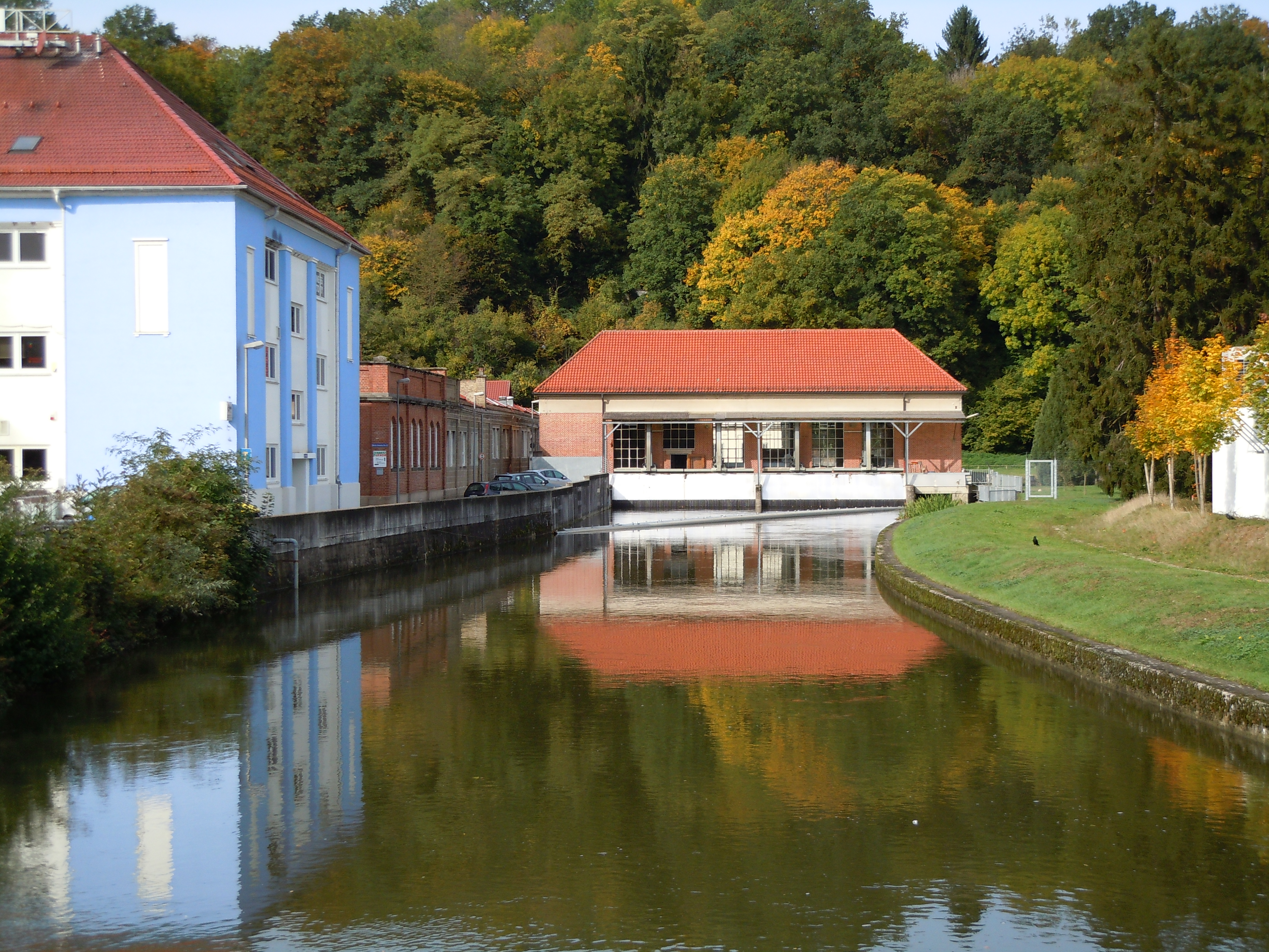 Wasserkraftwerk Neckartenzlingen. Der Übergang am Kraftwerk darf nur vom Kraftwerkspersonal benutzt werden.